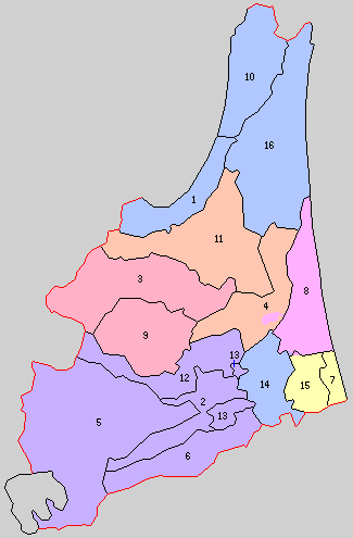 青森県上北郡の町村